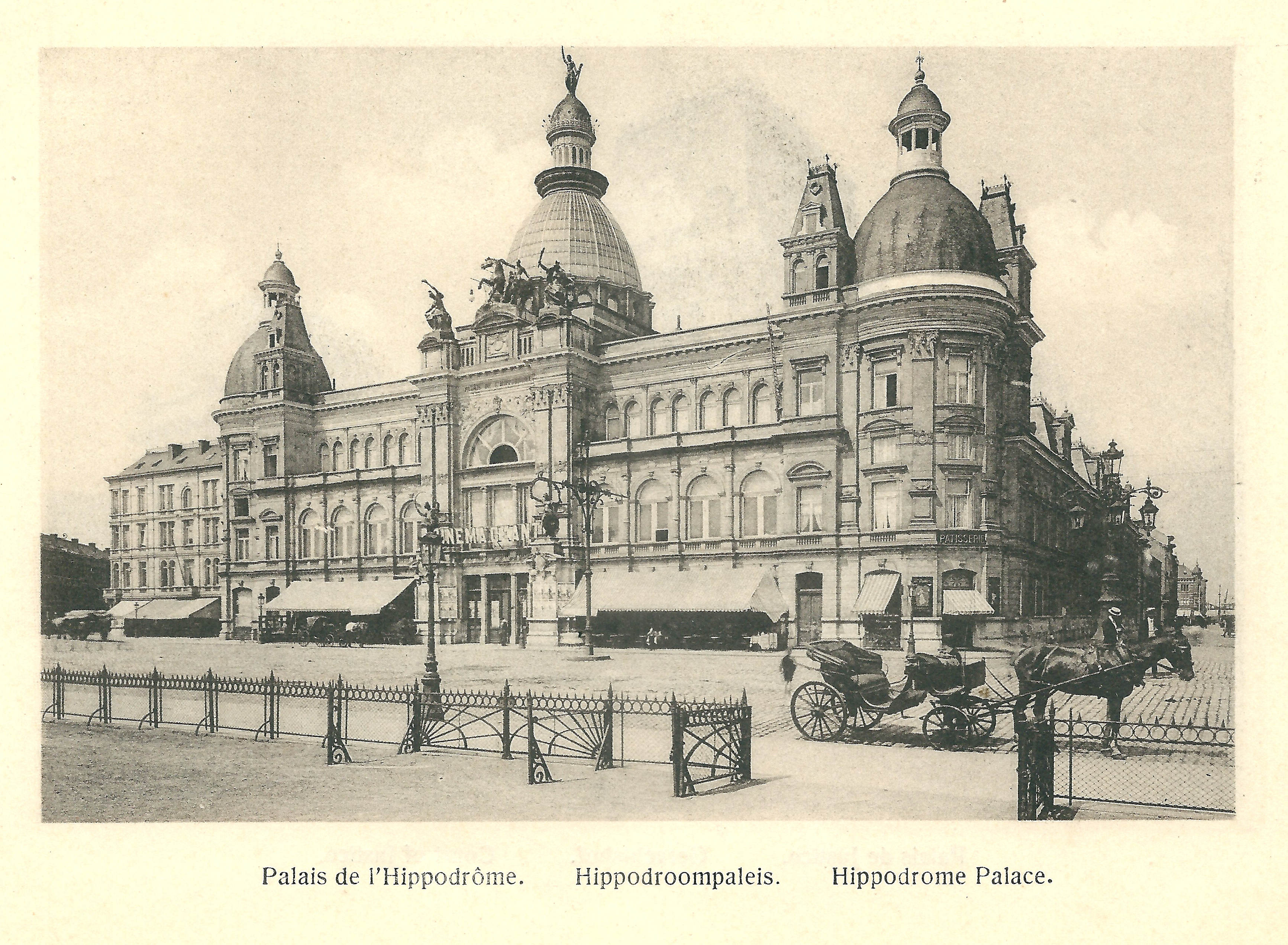 photographie légendée d'Anvers vers 1920